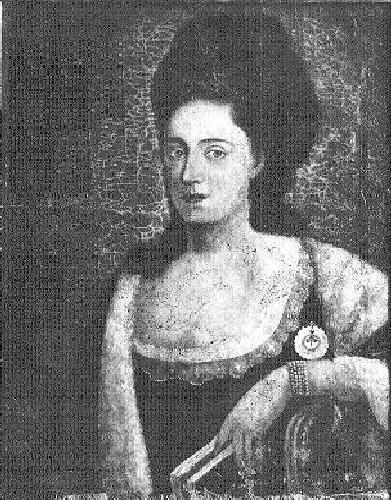 Dama da corte